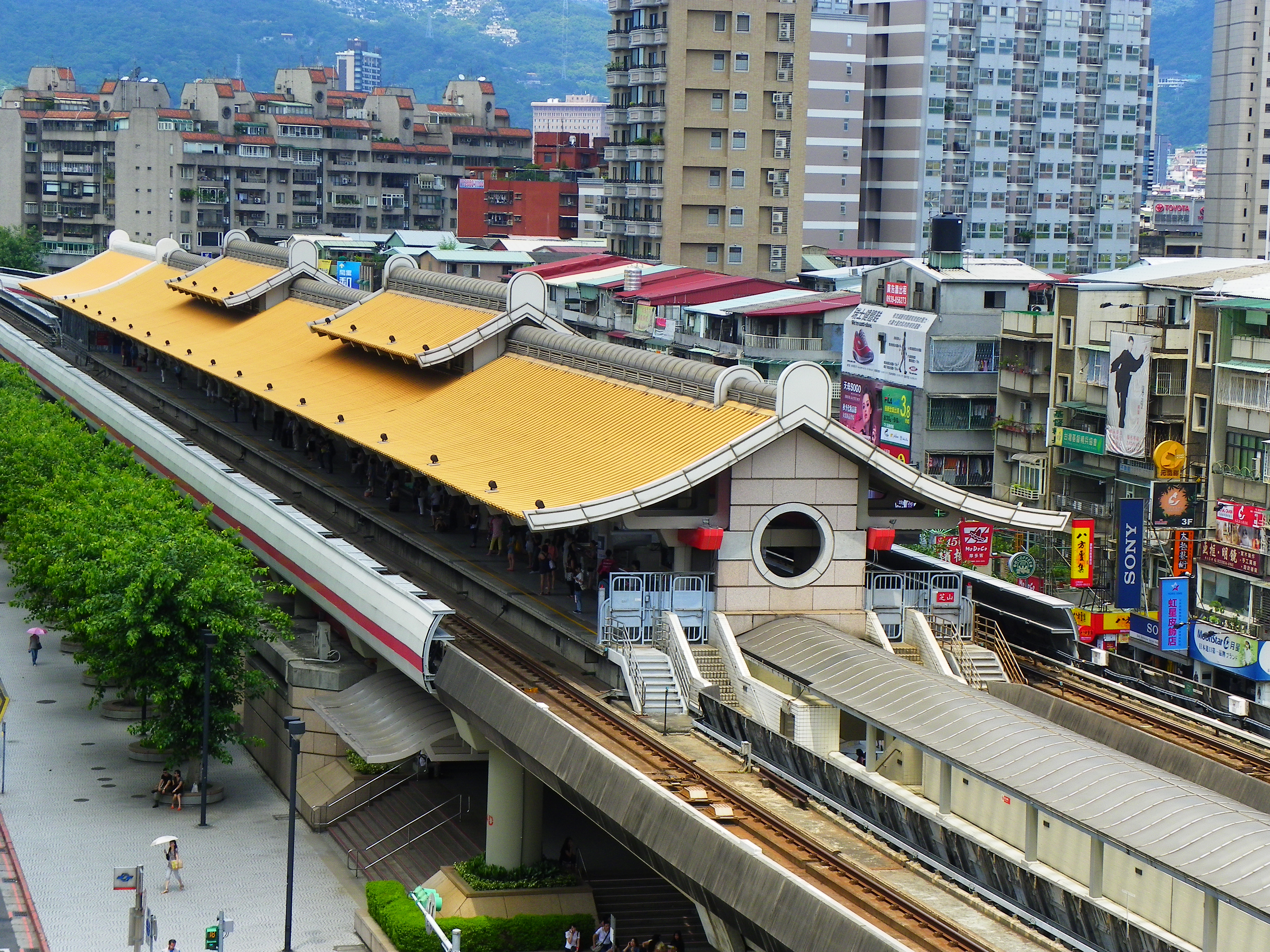 台北捷運淡水線芝山駅。